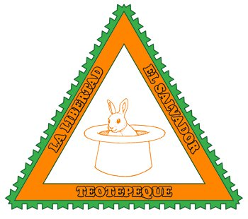 escudo de teotepeque